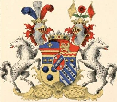 Kaulbarsi suguvõsa vabahärravapp